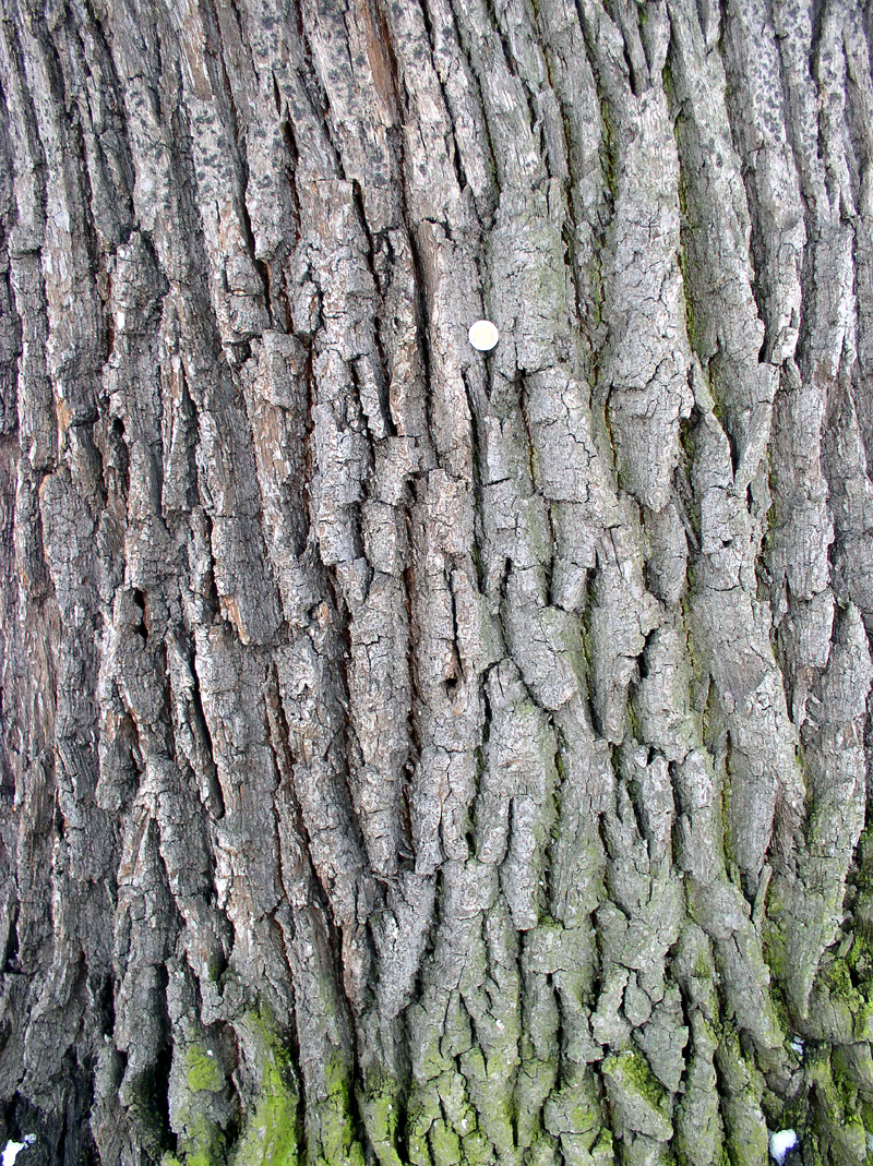 Kora dębu, obwód w pierśnicy 403 cm. Krążek w górnej części zdjęcia to 5-złotowa moneta.